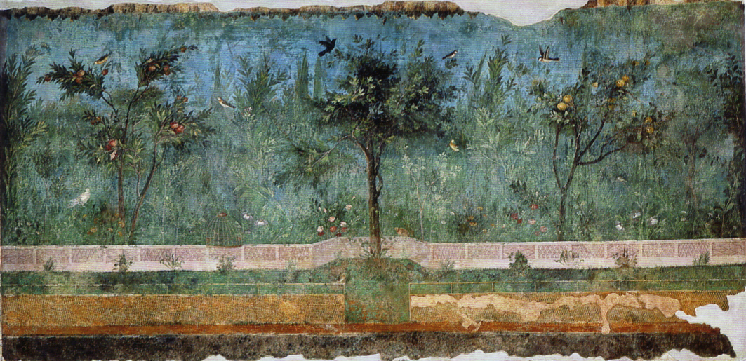 Rom, Villa der Livia in Primaporta, Gartenraum